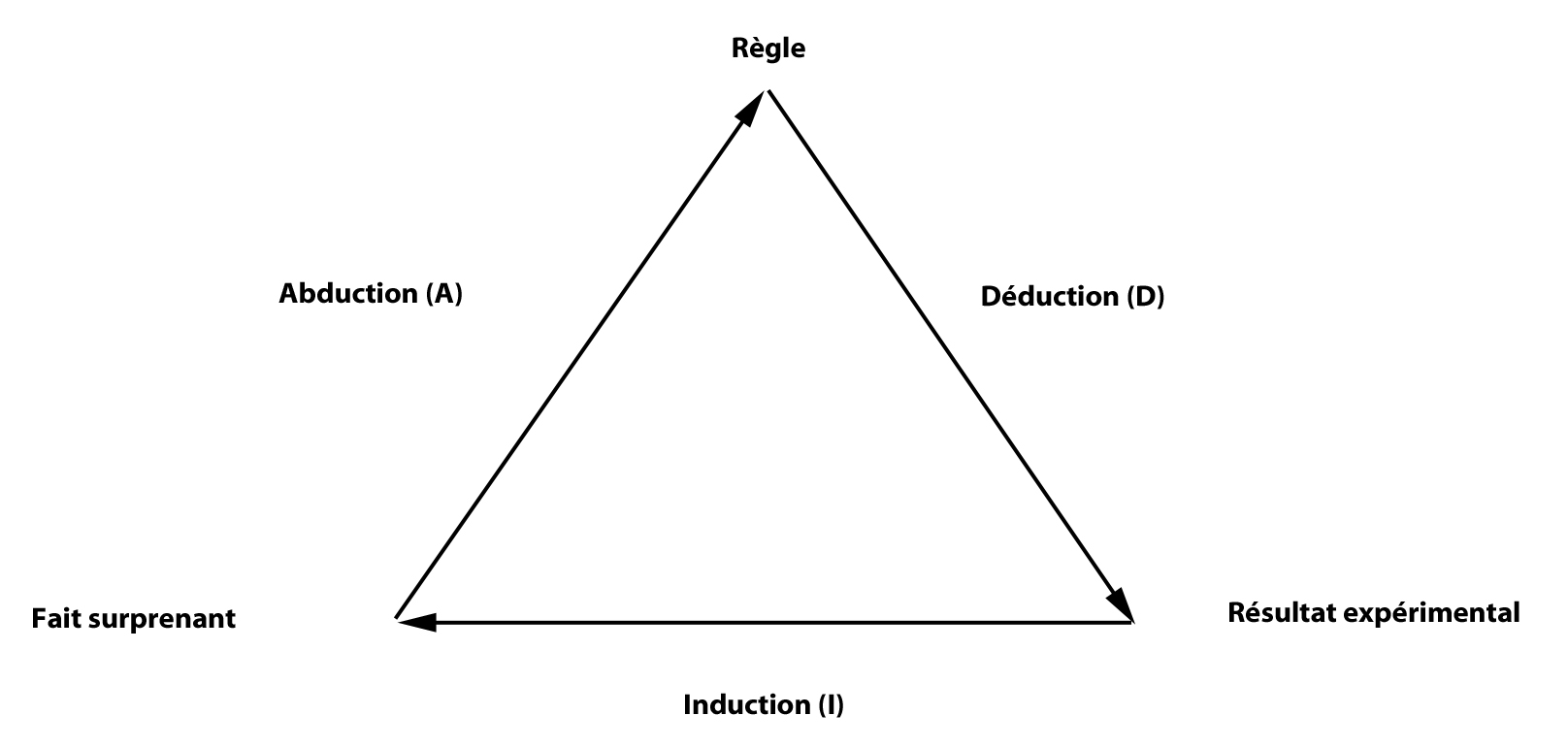 Schéma des trois types d'inférences selon Peirce d'après G. Minnameier, "Abduction, Induction, and Analogy".